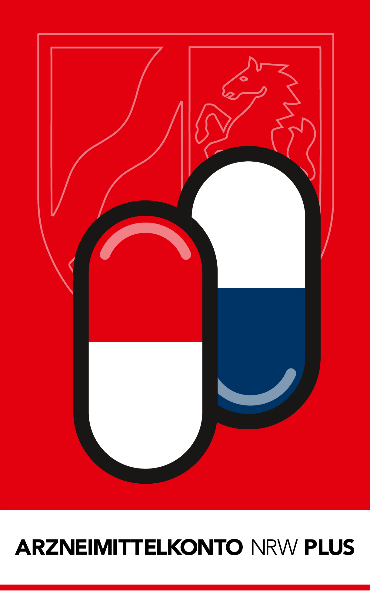 Logo Arzneimittelkonto NRW PLUS